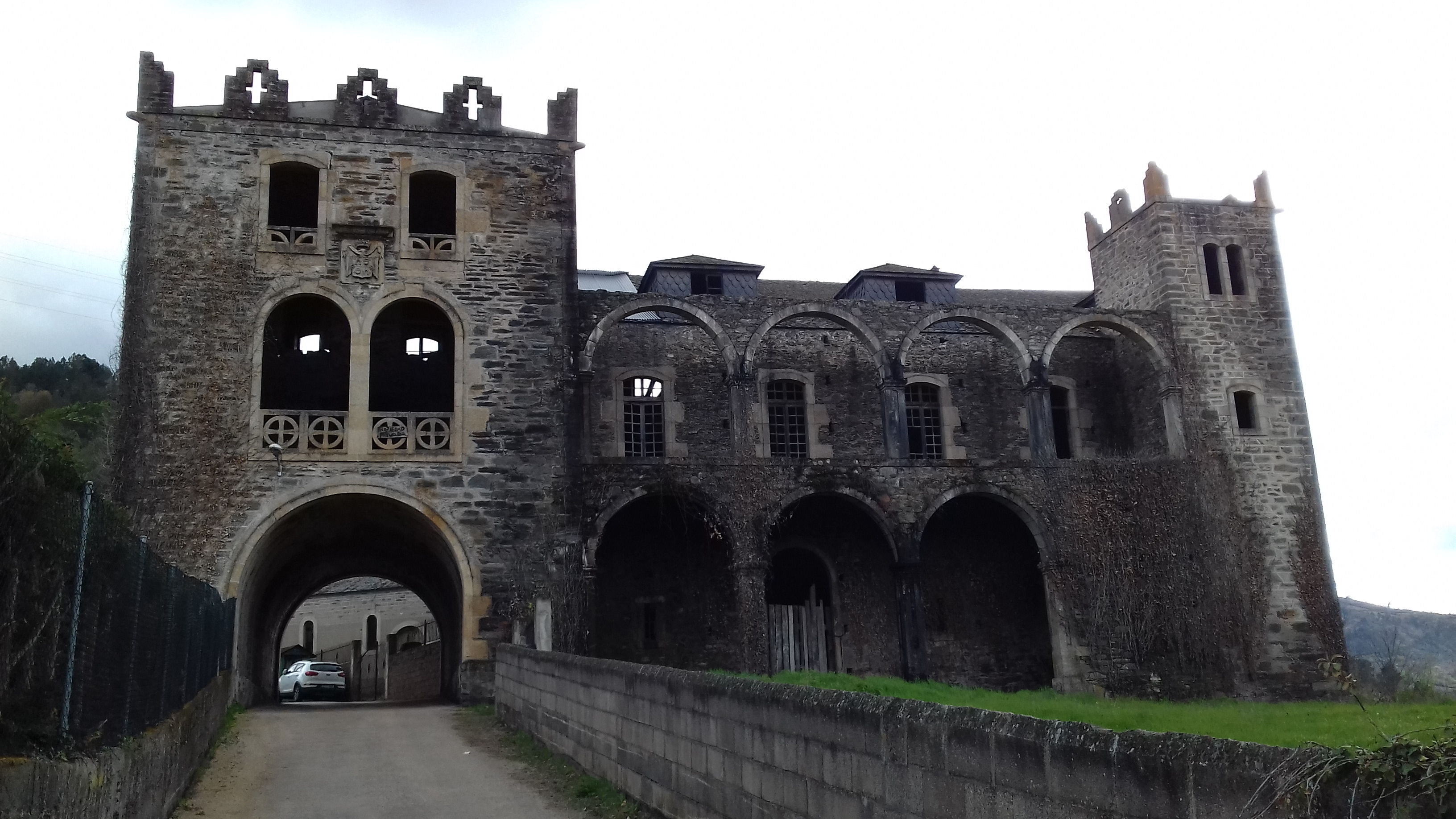 Pazo de Arnado, Vilamartín de Valdeorras